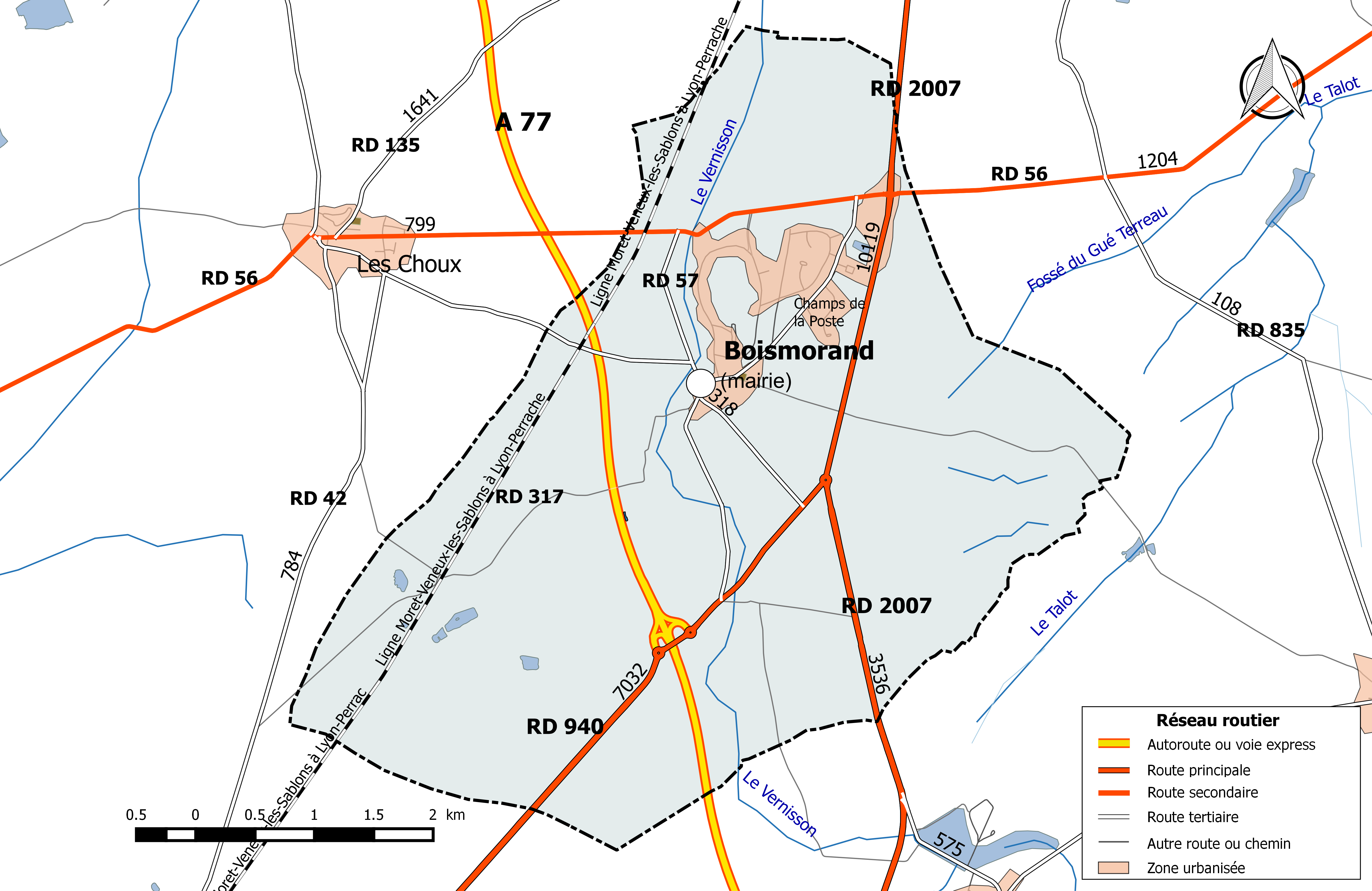 Carte du réseau routier de la commune de Boismorand.